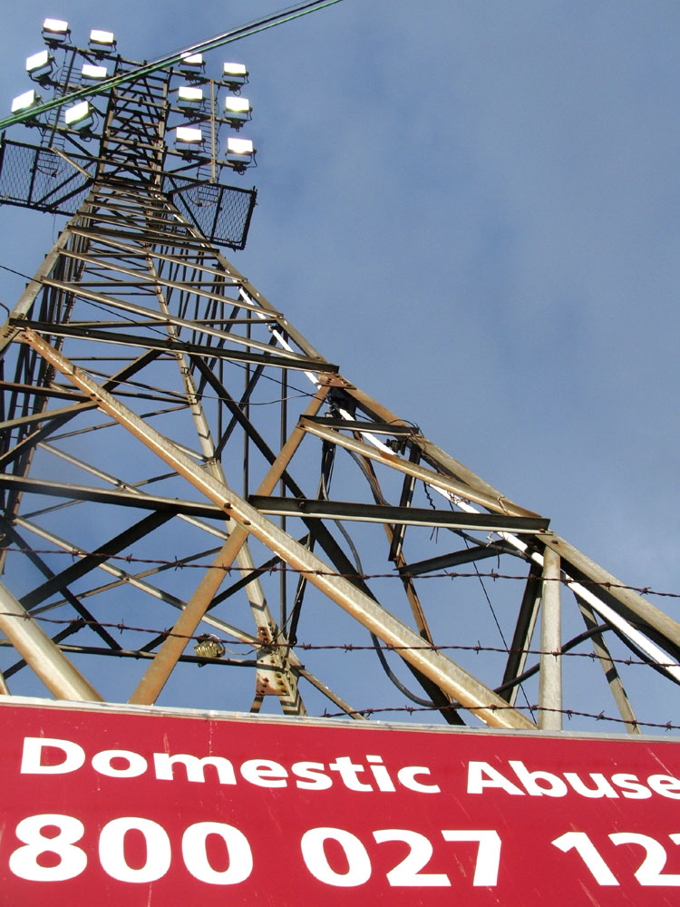 Floodlight, Palmerston Park, Dumfries